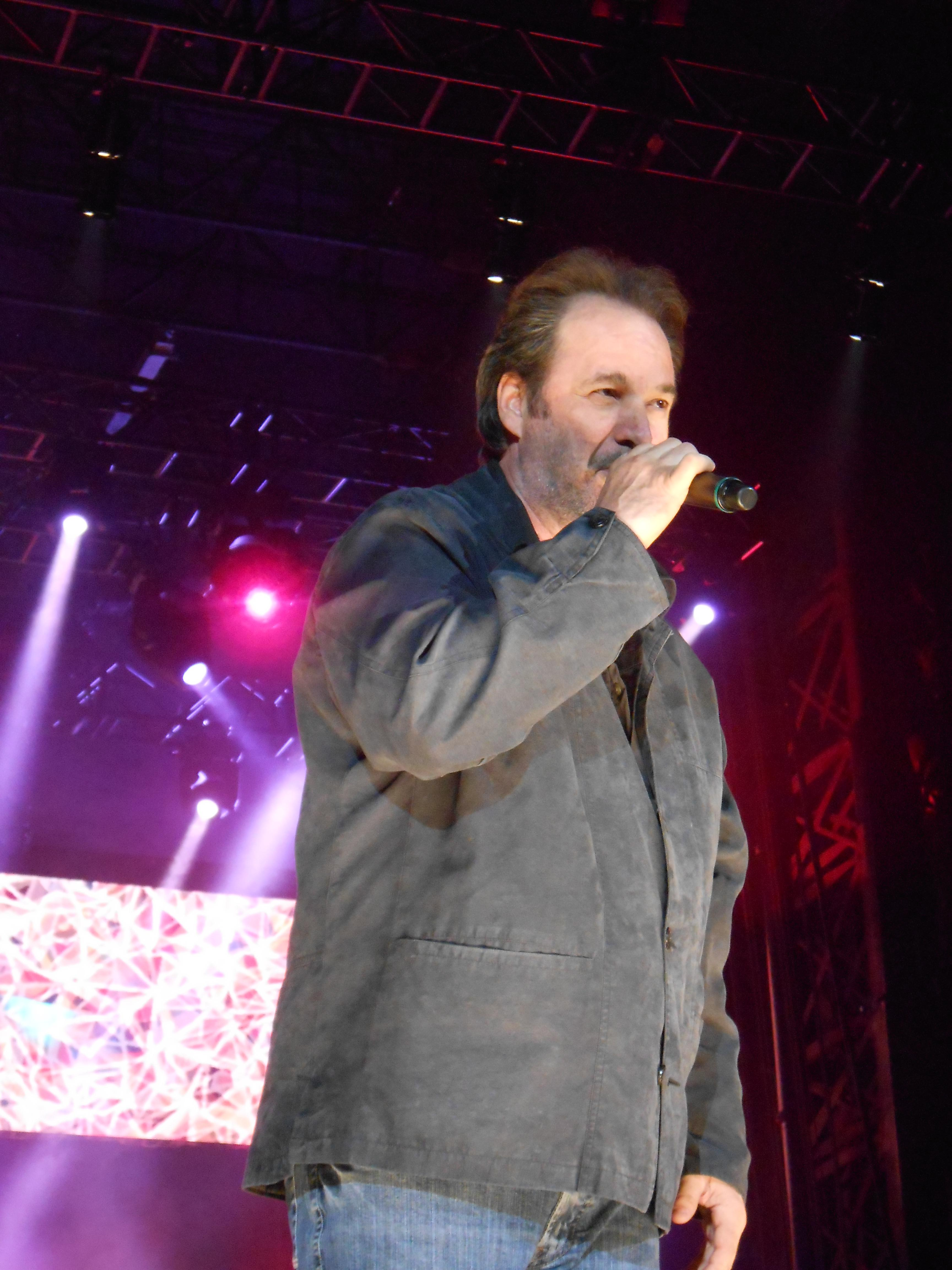 Pour célébrer les 25 ans des FrancoFolies de Montréal, le président, Alain Simard, a eu l'idée de réunir 25 artistes (ou groupes) qui chanteraient chacun LA chanson de leur répertoire la plus connue du public. Le spectacle a eu lieu lundi le 17 juin 2013 à partir de 21:00 à la place des Festivals. Dans l'ordre, sont apparus : Karim Ouellet, Ariane Moffatt, Richard Séguin, Corneille, Lisa LeBlanc, Daniel Lavoie, Mara Tremblay, Mes Aïeux, Luc De Larochelière, Dumas, Isabelle Boulay, Yann Perreault, Laurence Jalbert, Stefie Shock, Michel Rivard, Pierre Lapointe, Dan Bigras, Paul Piché, Vincent Vallières, Les Respectables, Damien Robitaille, Loco Locass, Daniel Boucher, Marjo et Éric Lapointe.